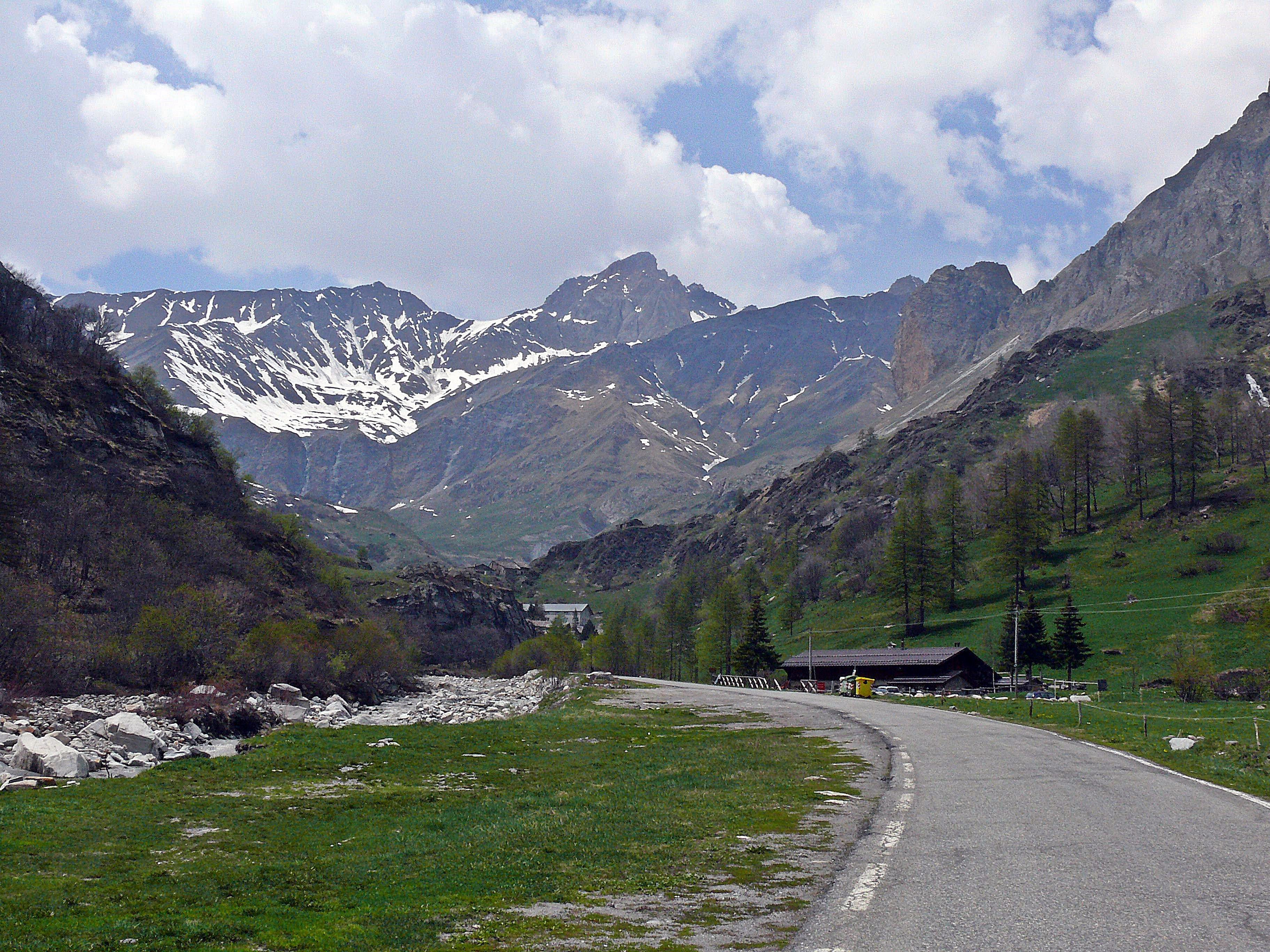 Valle Varaita, Rifugio Melezè